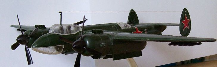 Tu-2 bombázó repülőgép makettje